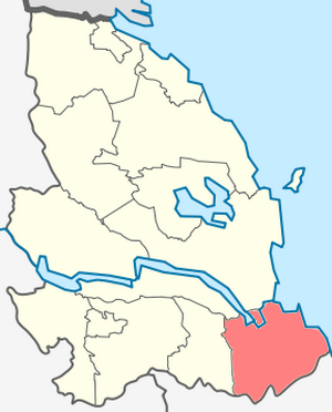 Запорожское сельское поселение